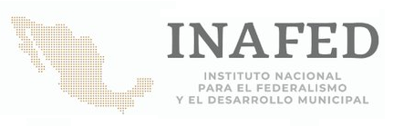 Logo del Instituto Nacional para el Federalismo y el Desarrollo Municipal